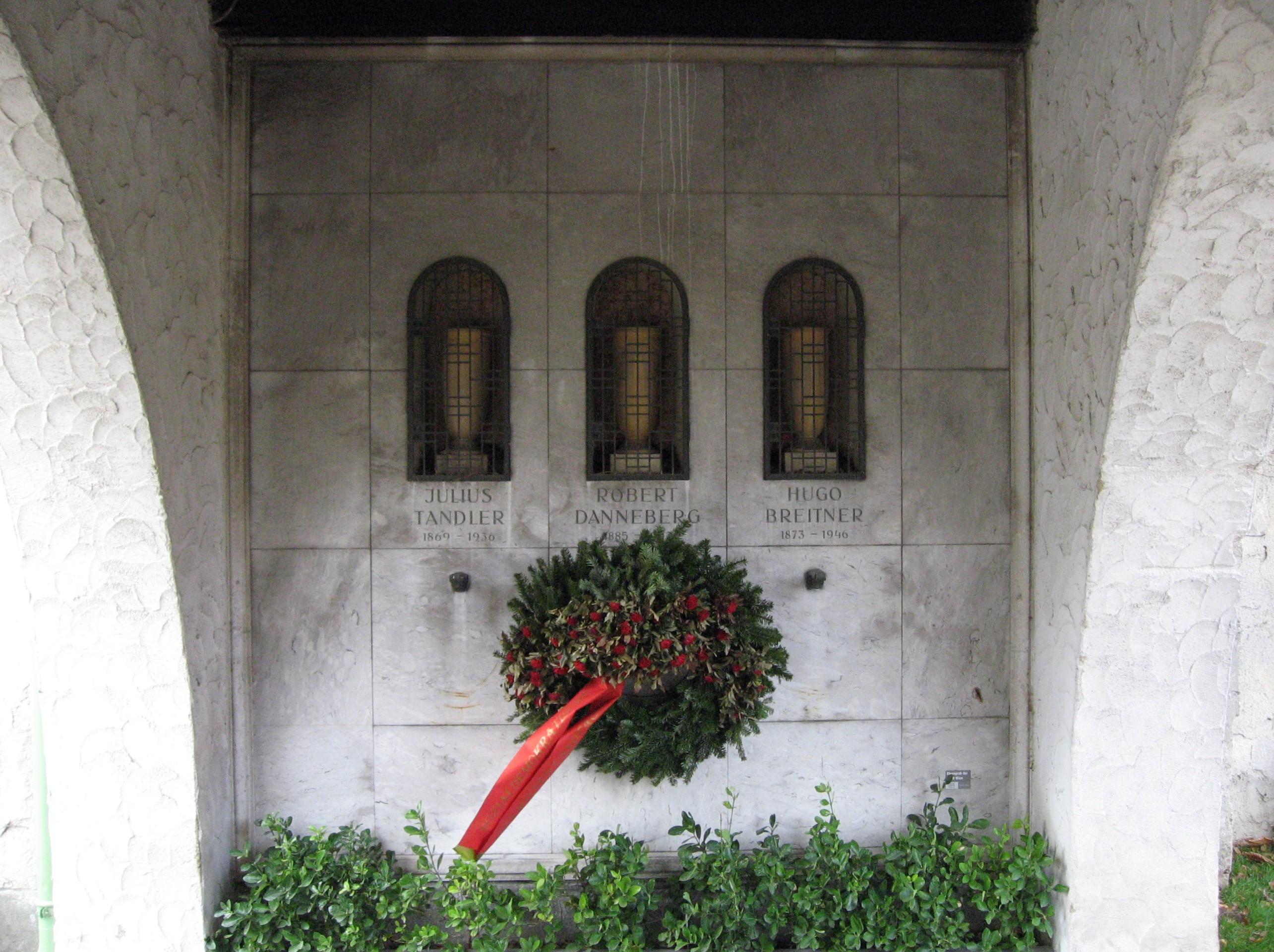 Wien, Feuerhalle Simmering, linke Arkaden (Abteilung ML): Urnengräber Tandler, Danneberg, Breitner